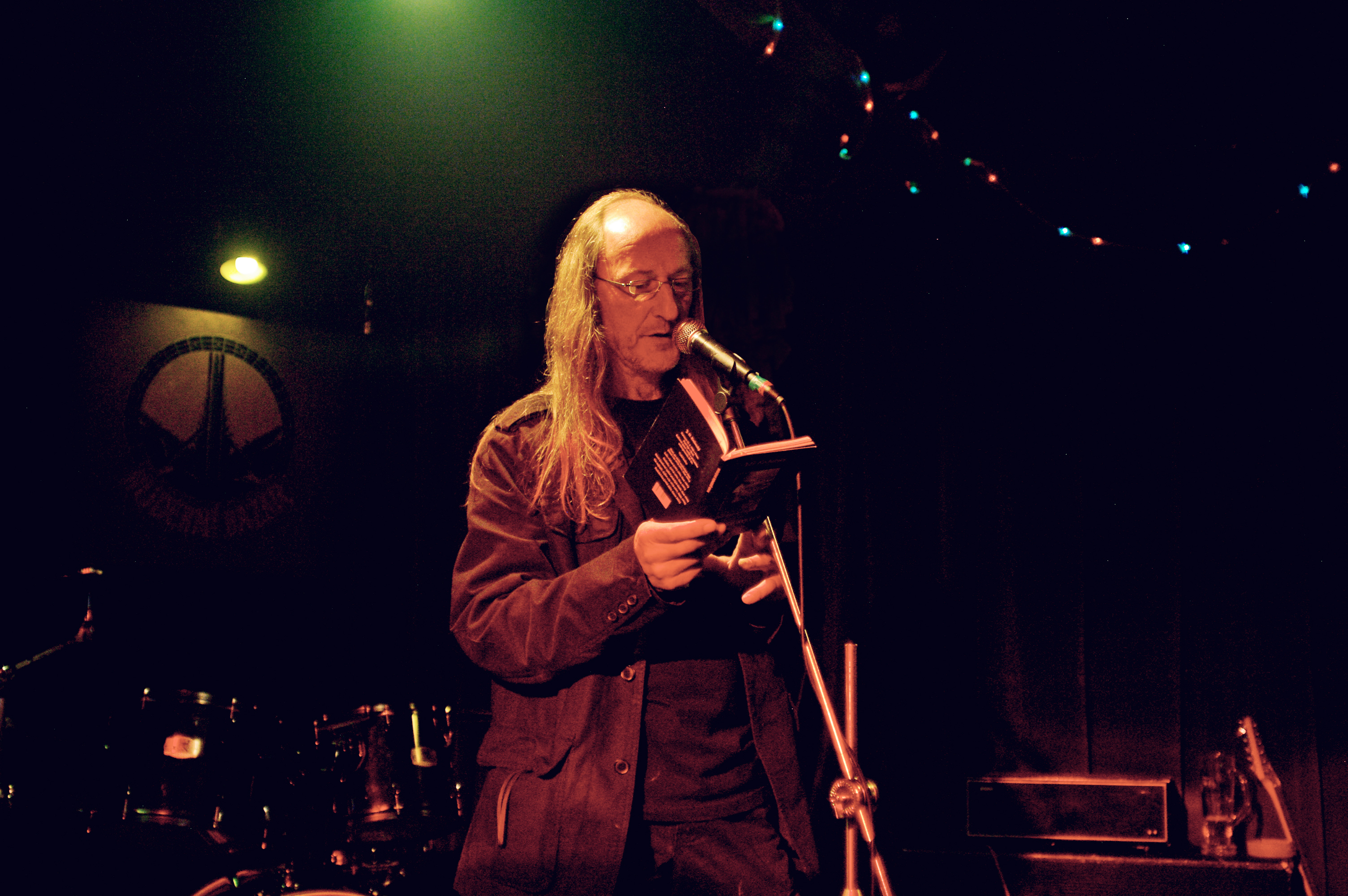 J. H. Krchovský autorské čtení na festivalu Butterfly Effect v ostravském klubu Hudební bazar, 2012, Ostrava, 2012